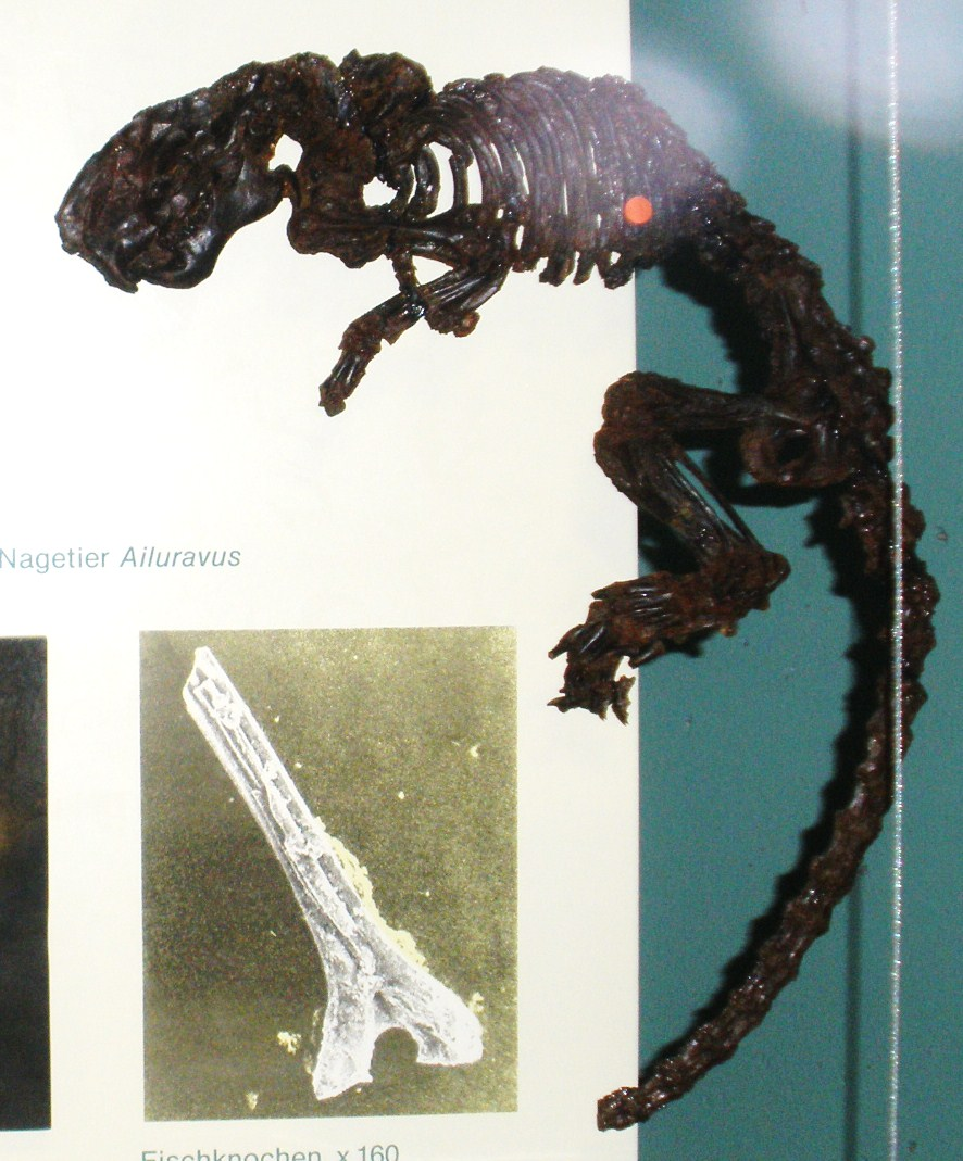 Fossil of Ailuravus, an extinct rodent- Took the photo at Senckenberg Museum of Frankfurt